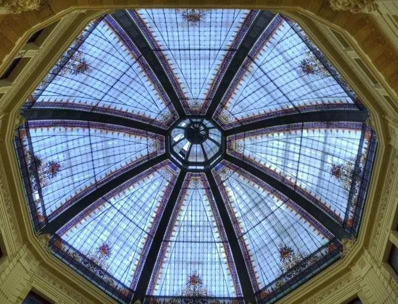 Zagreb